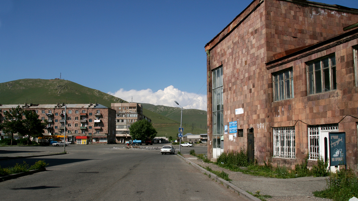 Centre-ville de Sevan en Arménie